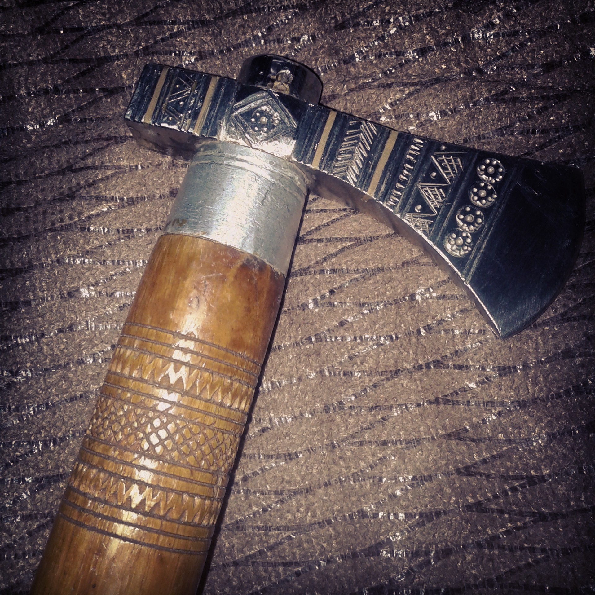 جرز قبيلة الظهوريين